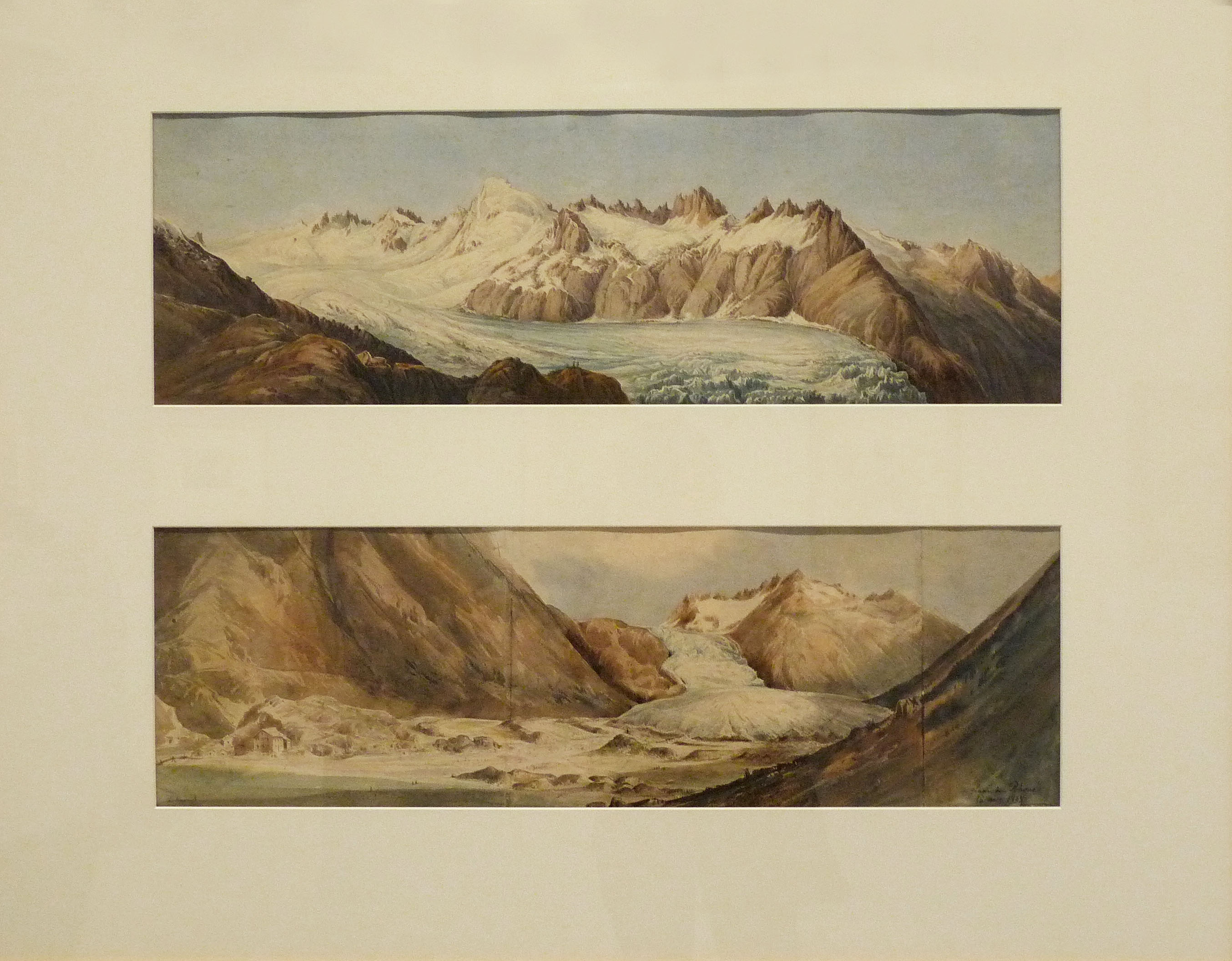 Glaciers du Rhône. 1. Partie supérieure. 2. Partie inférieure, Henri Hogard (1808-1880), aquarelle, août 1848, Cabinet des estampes et des dessins de Strasbourg.